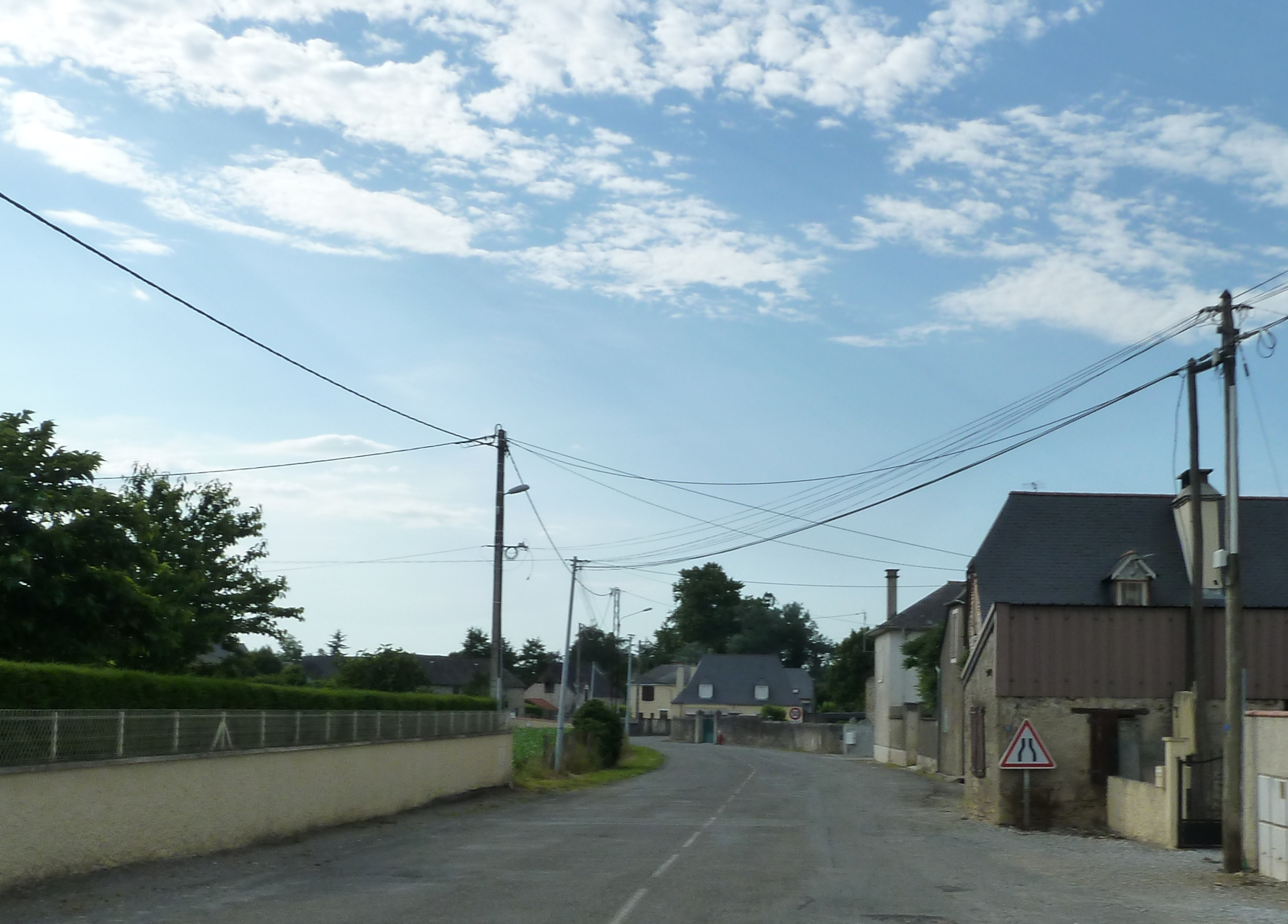 Angaïs